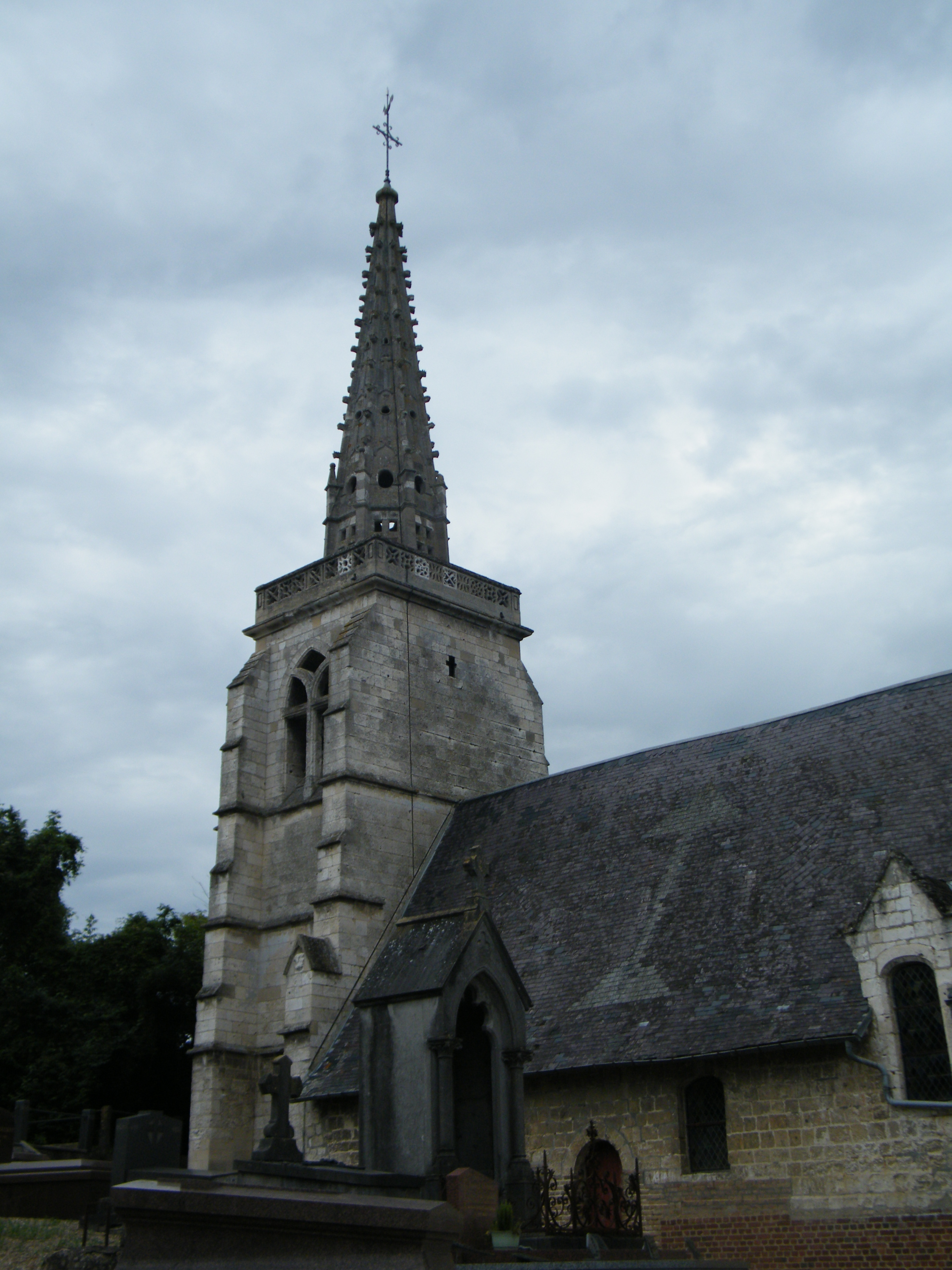 Église Saint-Pierre.